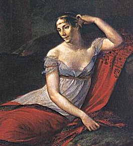 detail